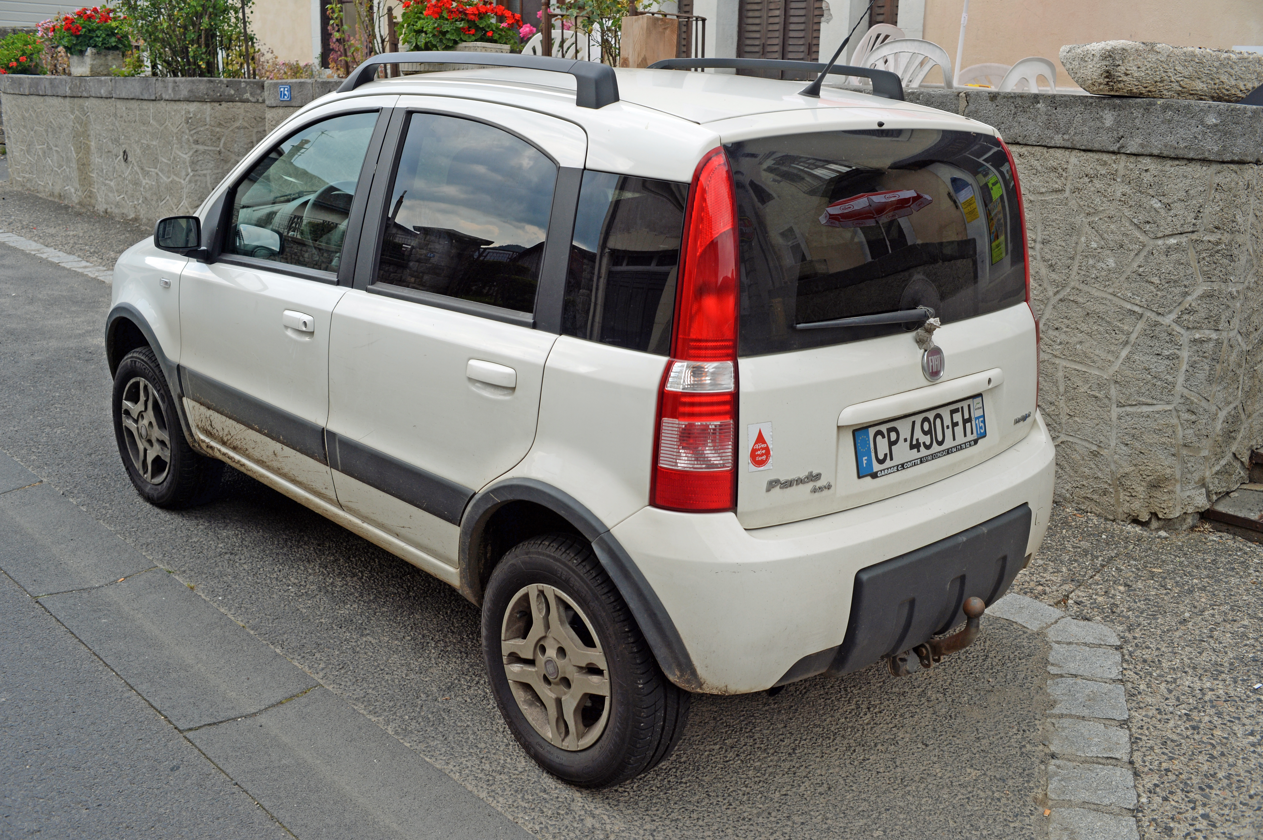 Fiat Panda 4x4